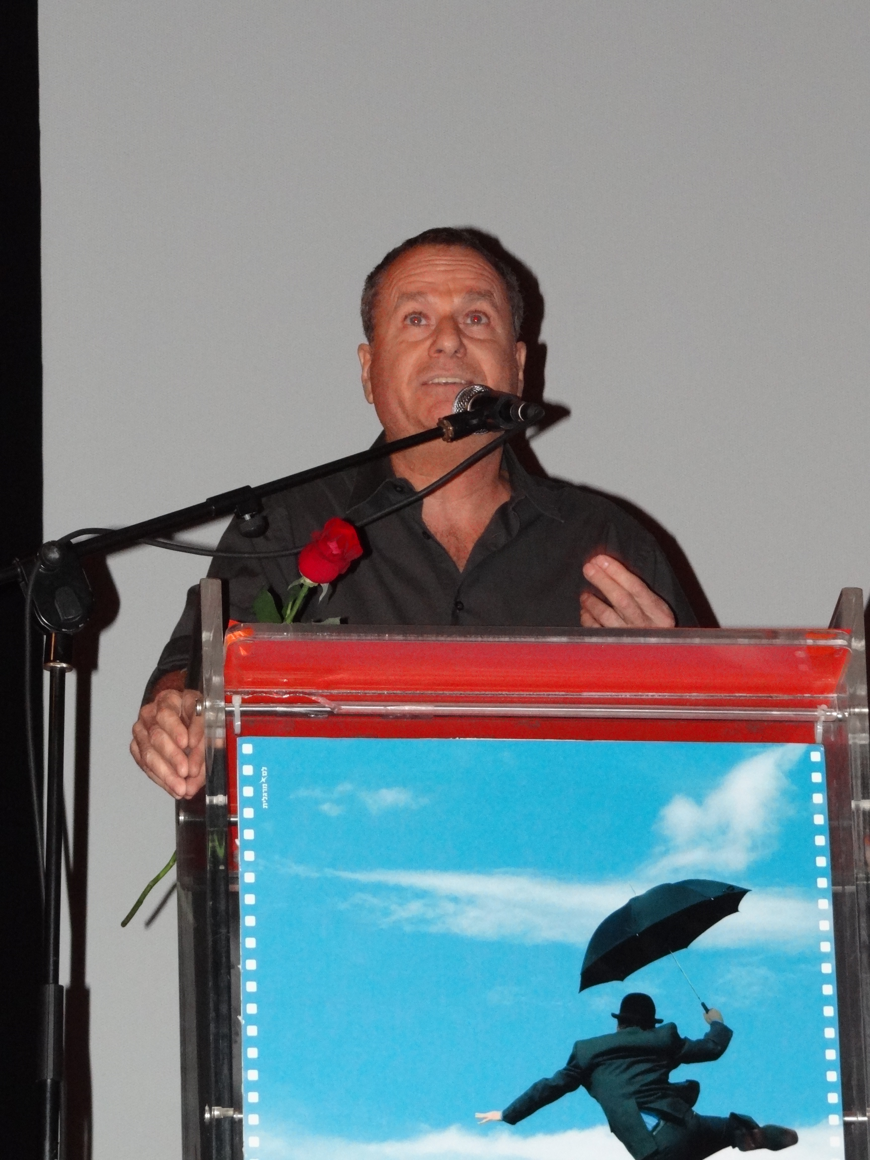 שלמה בר אבא בפסטיבל הסרטים הבינלאומי חיפה, נושא דברים, לאחר שקיבל את פרס במבקרים מידי גידי אורשר על הופעתו בסרט הערת שוליים